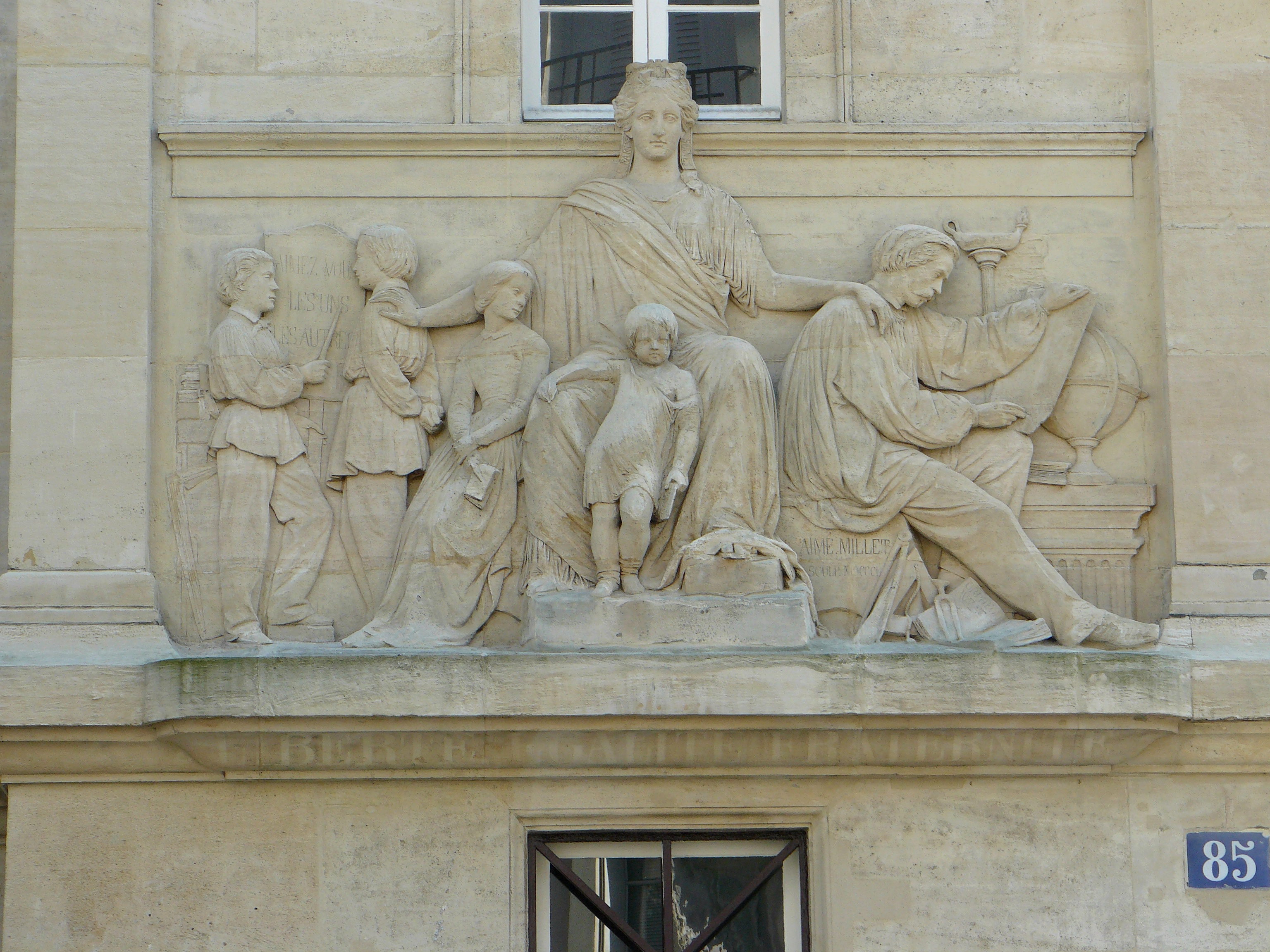 Ancien bâtiment de l'école mutuelle des parents, 85 rue de Vaugirard (Paris, 6e arrond). Bas relief d'Aimé Millet (1850) - façade inscrite au titre des Monuments historiques, ce bâtiment a abrité l'École technique de photographie et de cinéma, aujourd'hui École nationale supérieure Louis-Lumière transférée à Noisy-le-Grand. Inscriptions : "Aimez-vous les uns les autres. Paris. Seine. Aimé Millet sculp. MDCCCL."